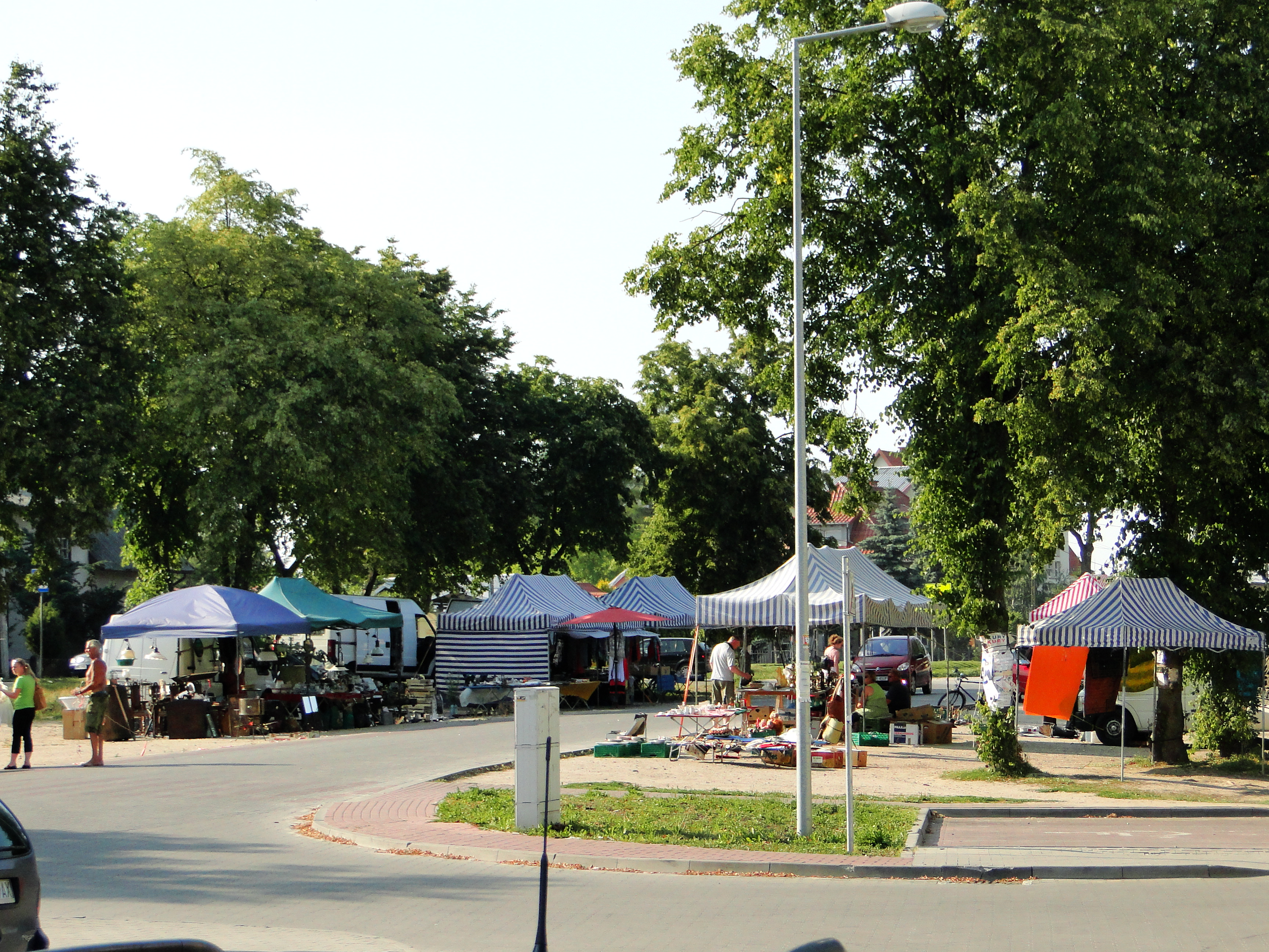 Plac targowy w Pieckach